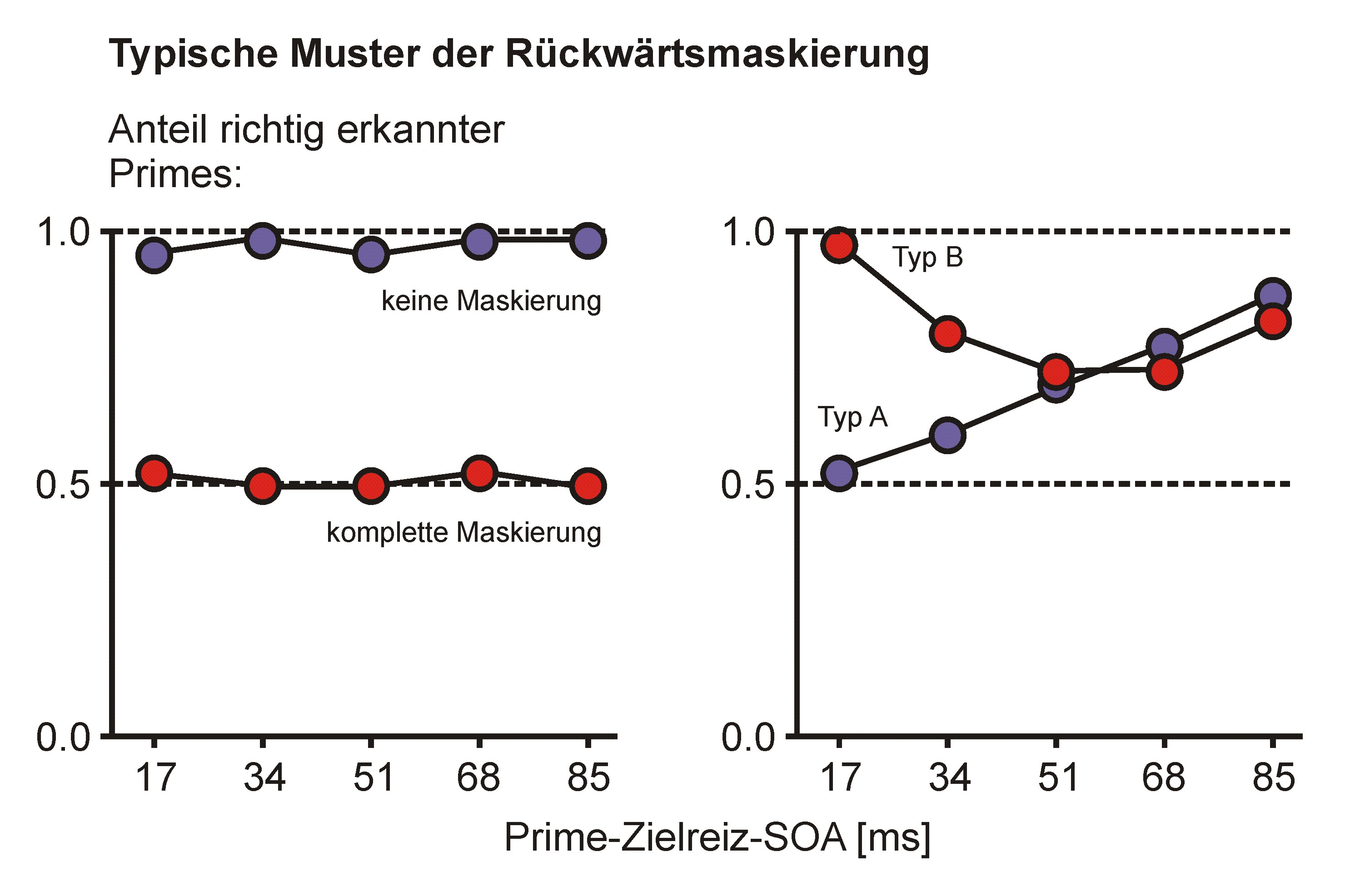 Typisches Muster einer Rückwärtsmarkierung